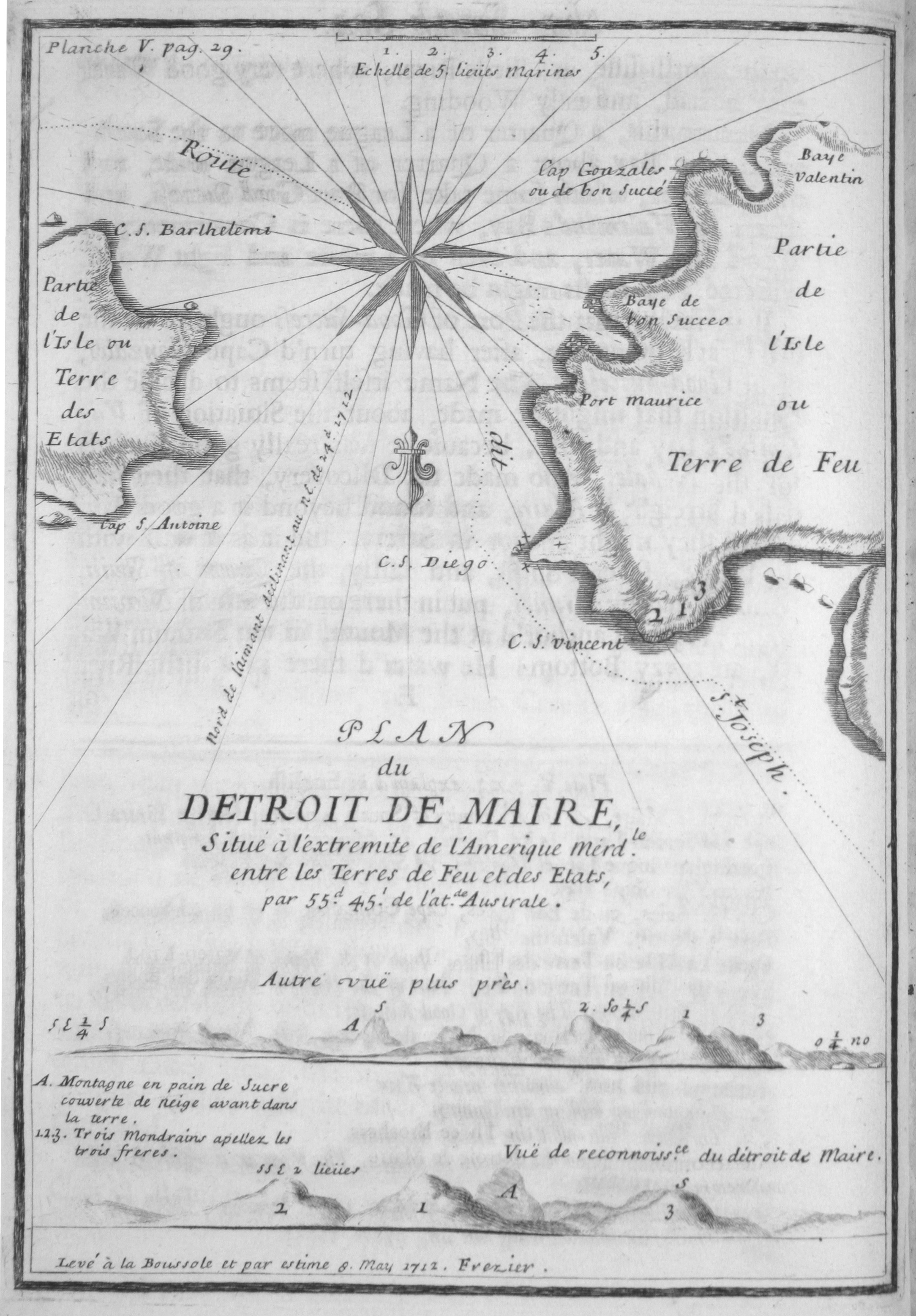 Planche V